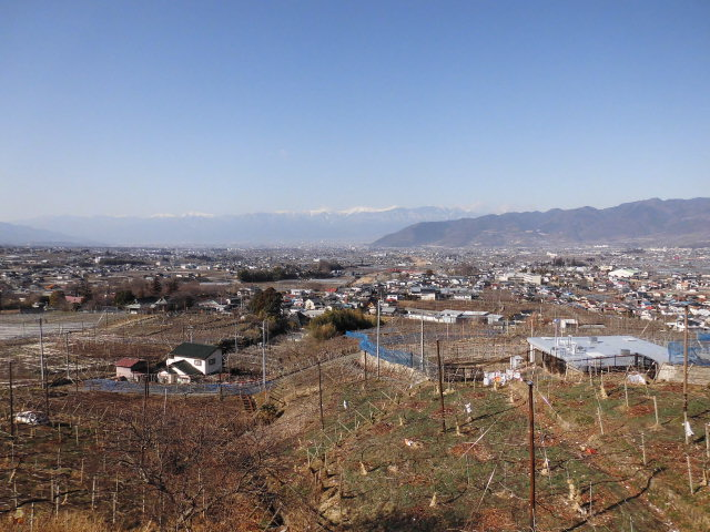 東夢ワイナリーと南アルプスの眺望